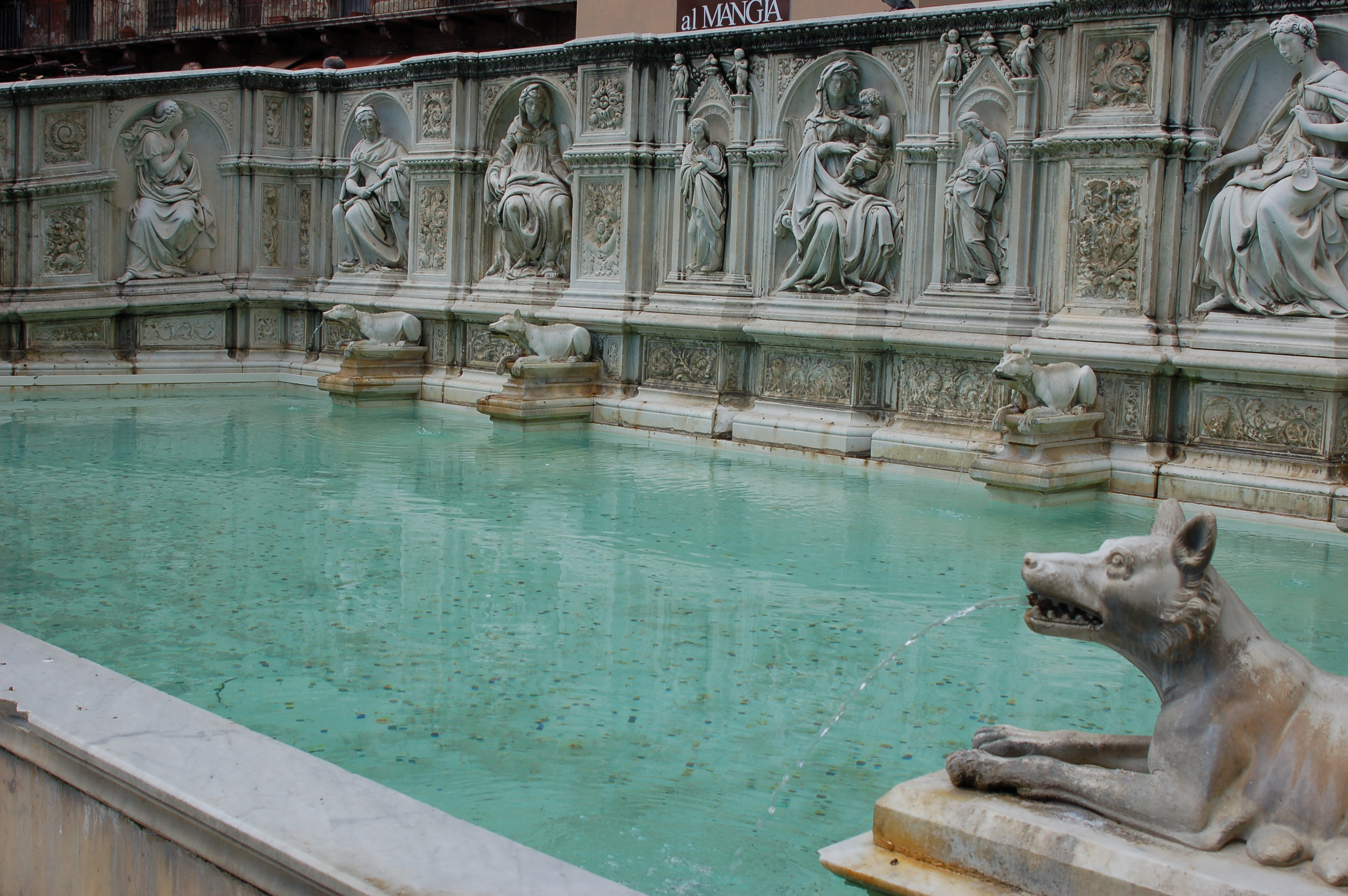 detalle de la fuente de la plaza del campo o de la Concha de Siena